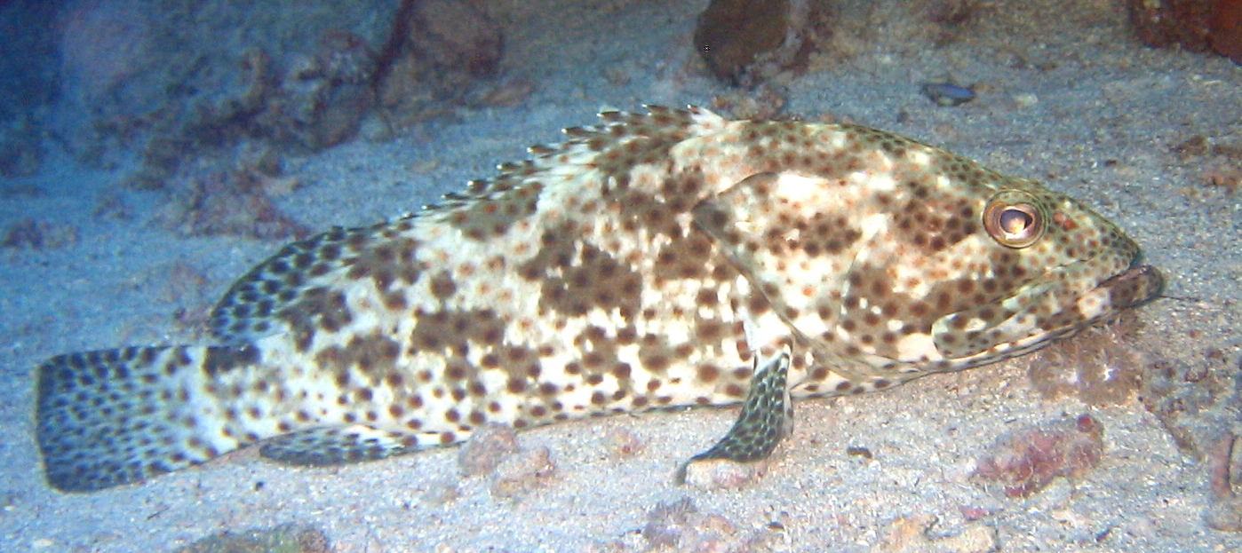 Mérou marbré, Egypte 2006, A. Laydier